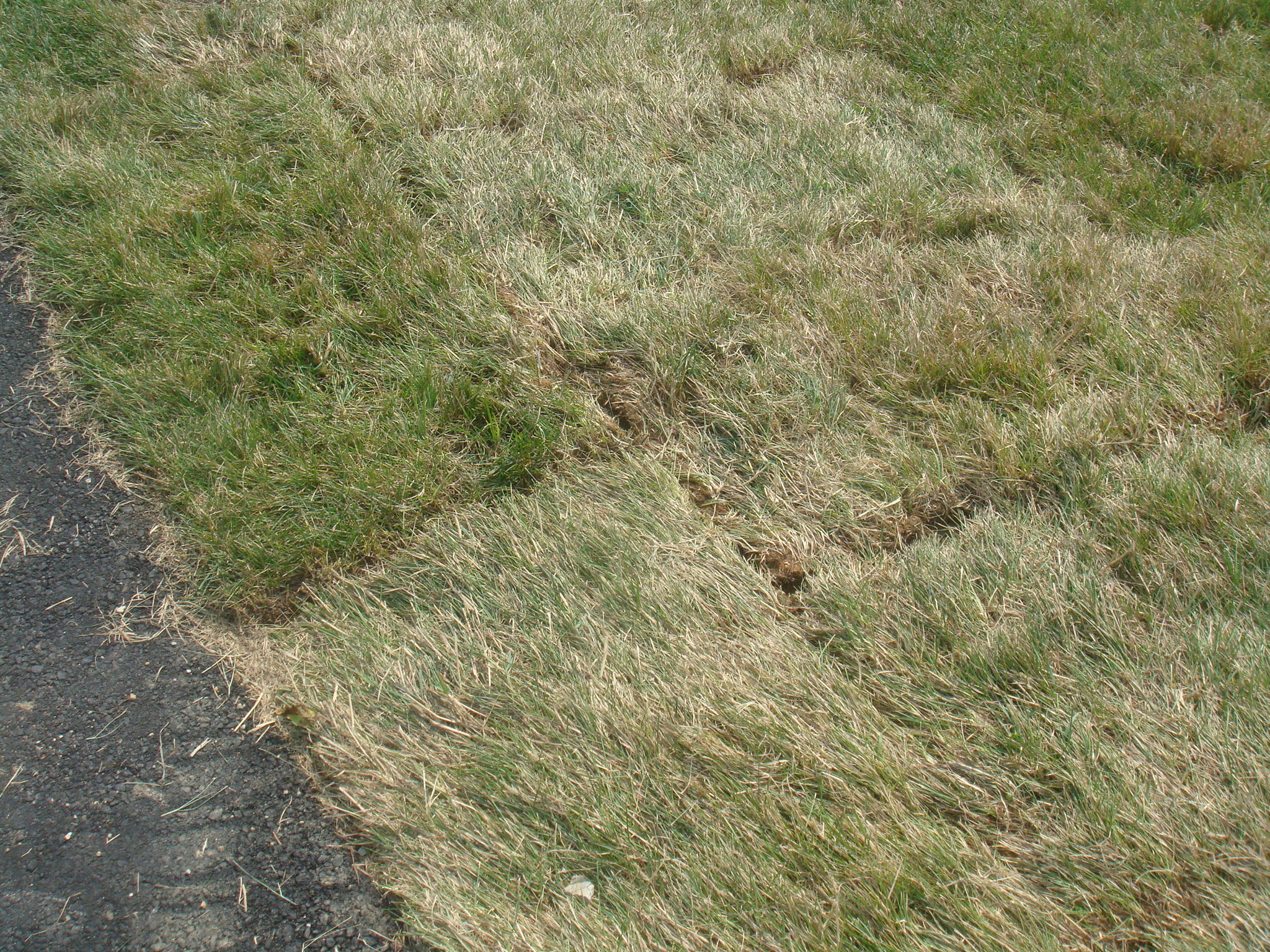 Рулонный газон в разложенном состоянии